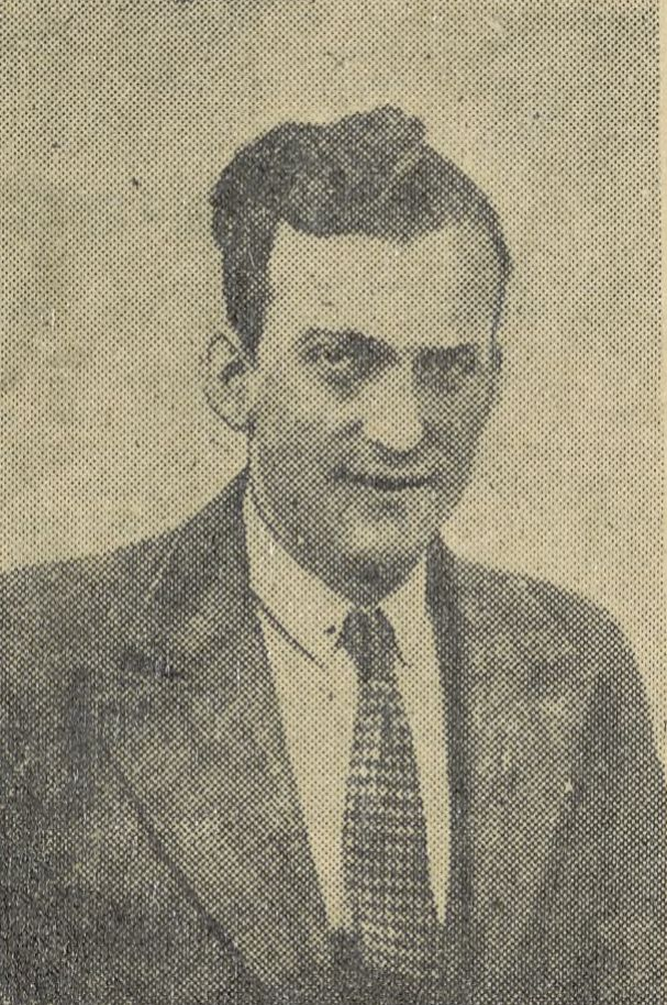 Job Jaffré, photo publiée dans L'Heure Bretonne du 28 février 1942, présenté comme "rédacteur en chef de l'Heure Bretonne".